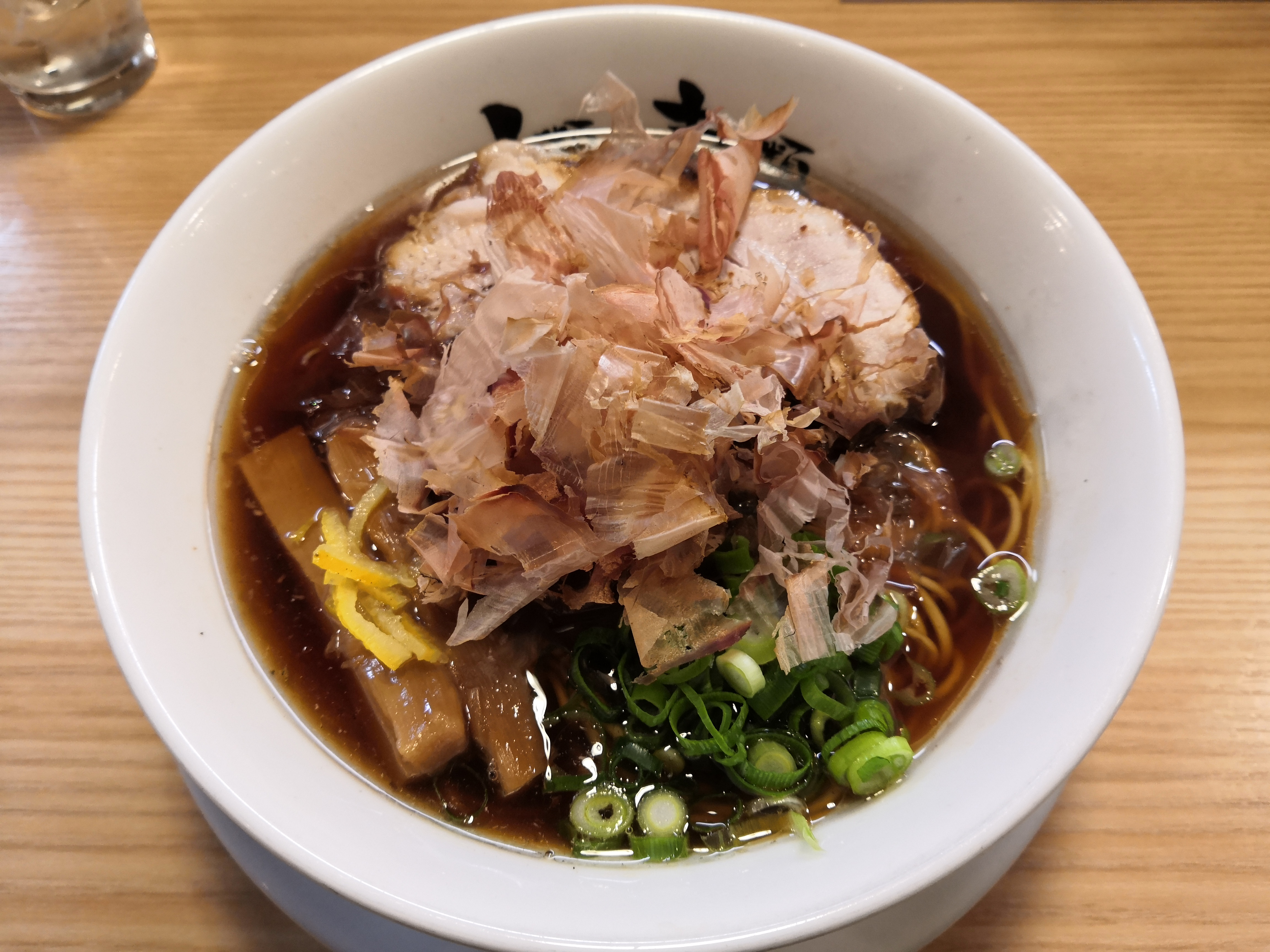 UNCHI株式会社のラーメン。2019年12月31日〜2020年1月1日の期間限定で人類みな麺類にて500円で提供された。